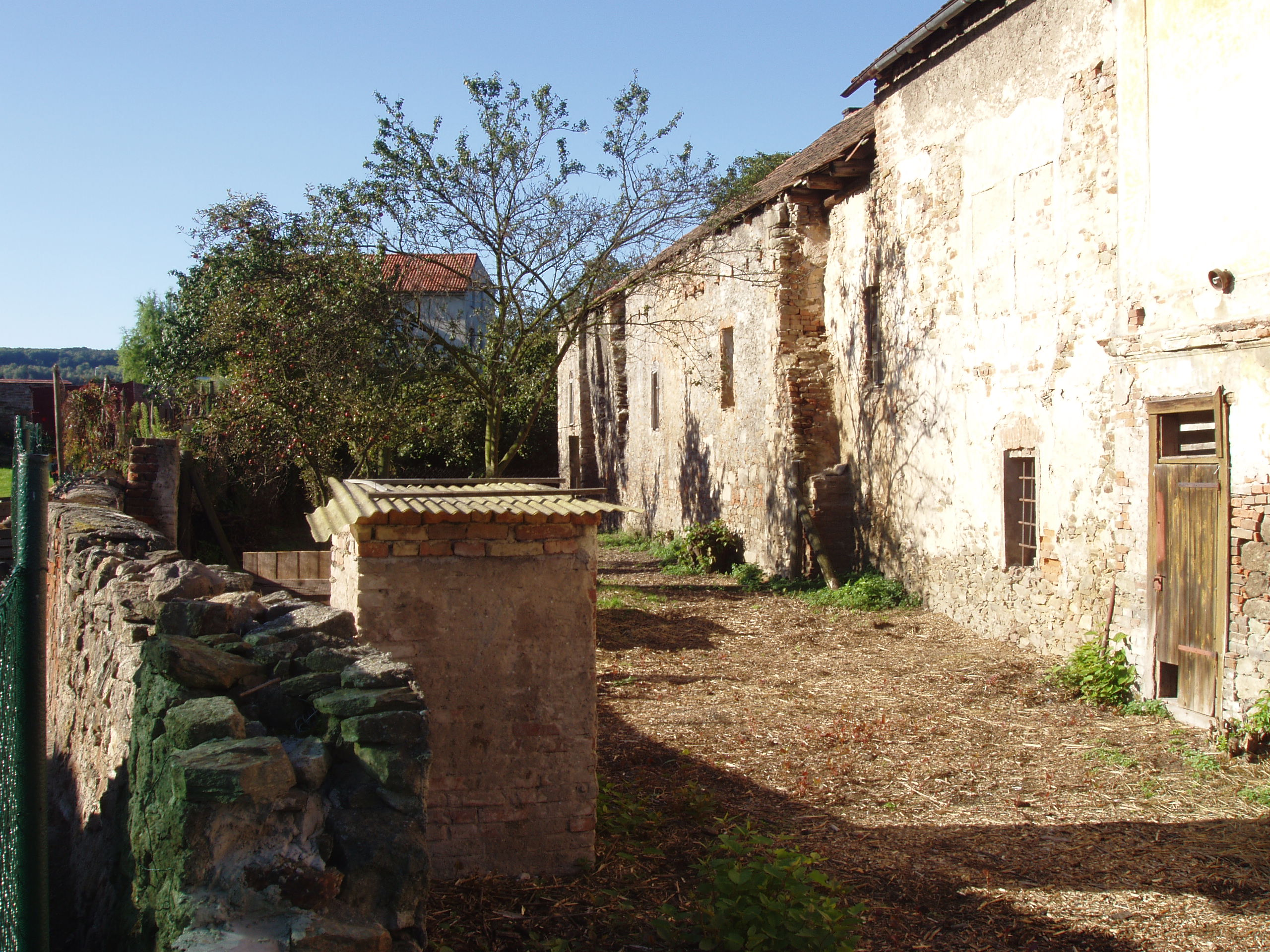 Zřícenina tvrze, Libenice 1